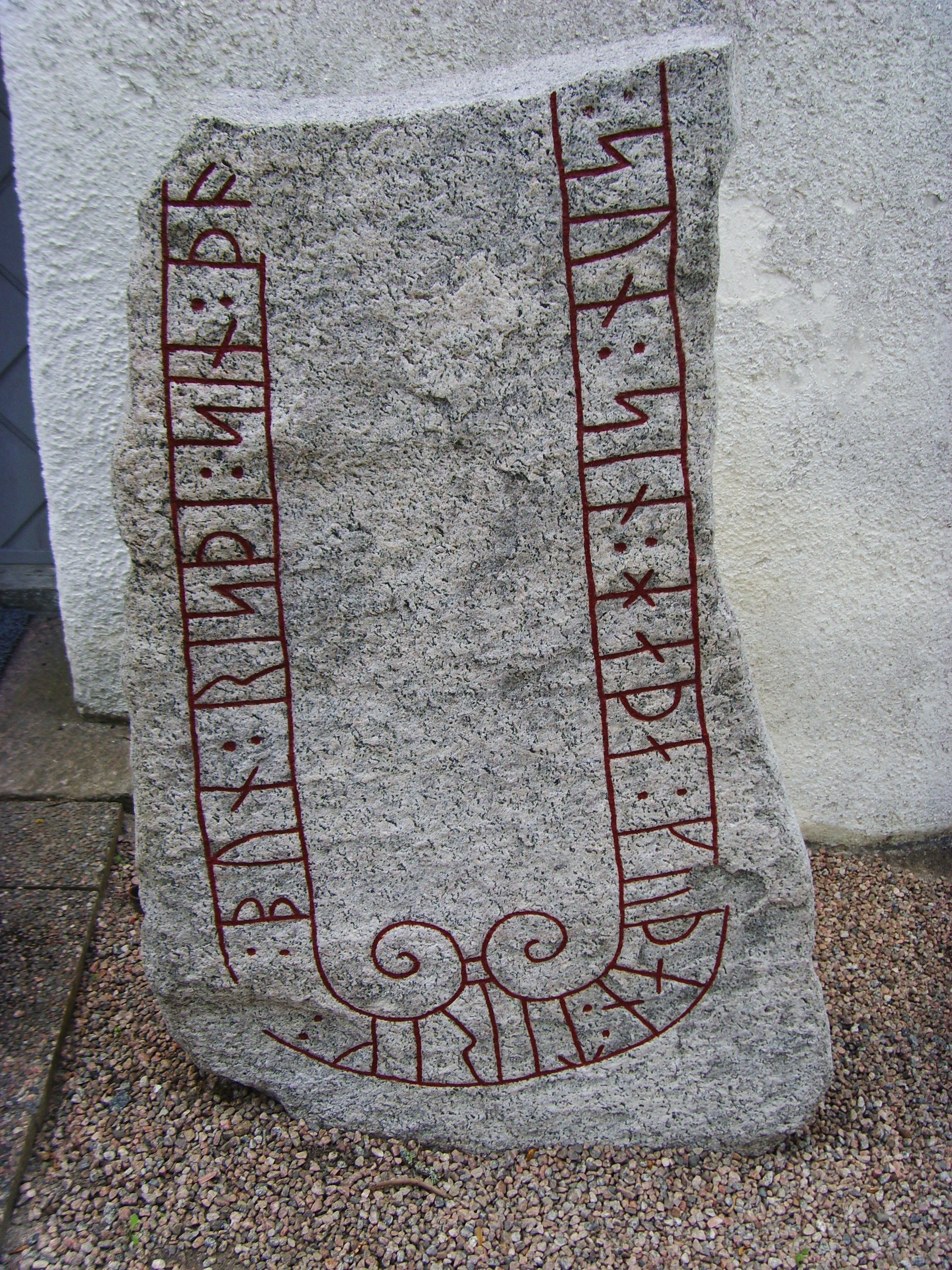 Runstenen RAÄ Fölene 3:2 (Vg 153) är placerad till höger om ingången till Fölene kyrka.